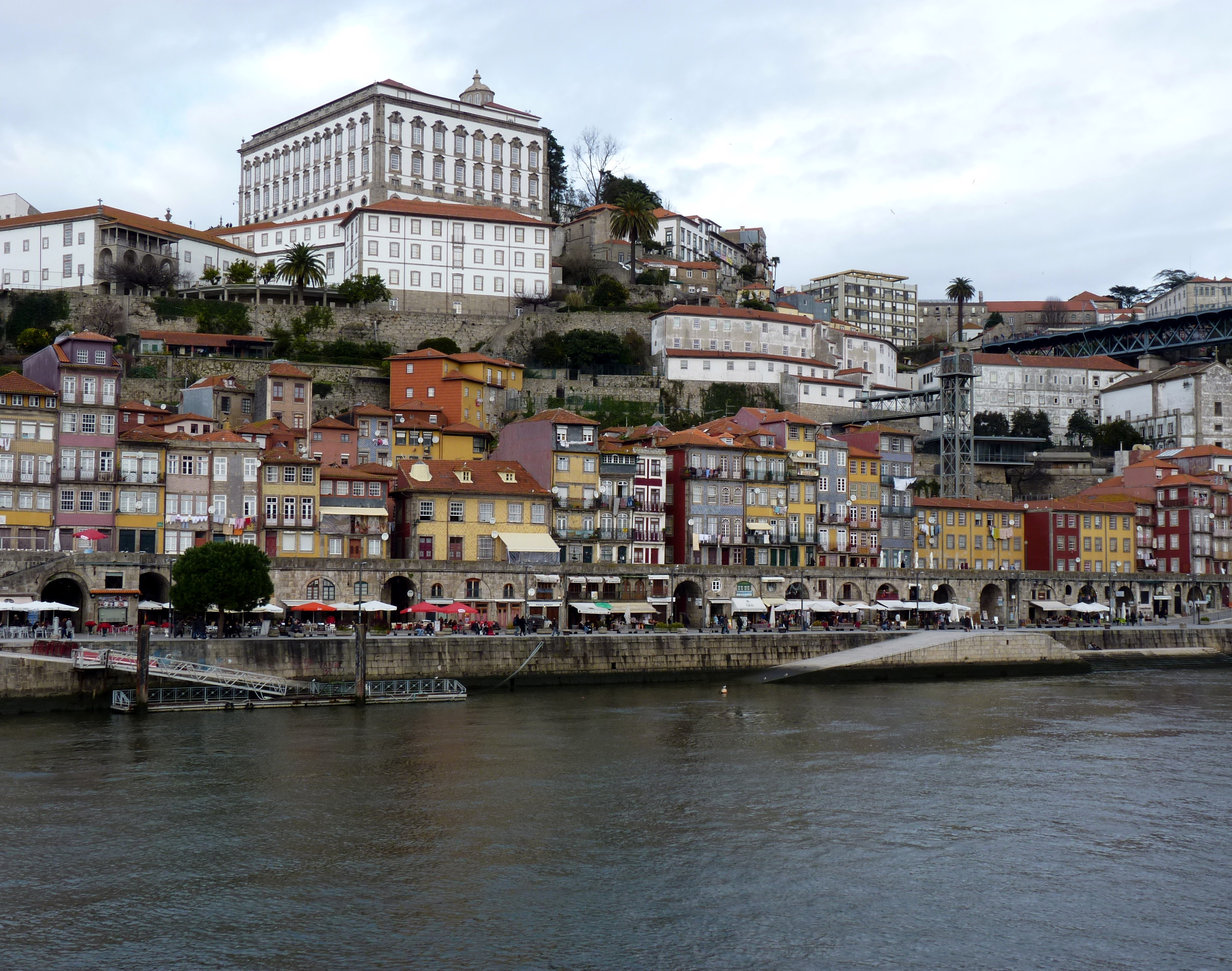 Centro Histórico do Porto This file was uploaded for Wiki Loves Monuments in Portugal with the unique identifier 11871408.